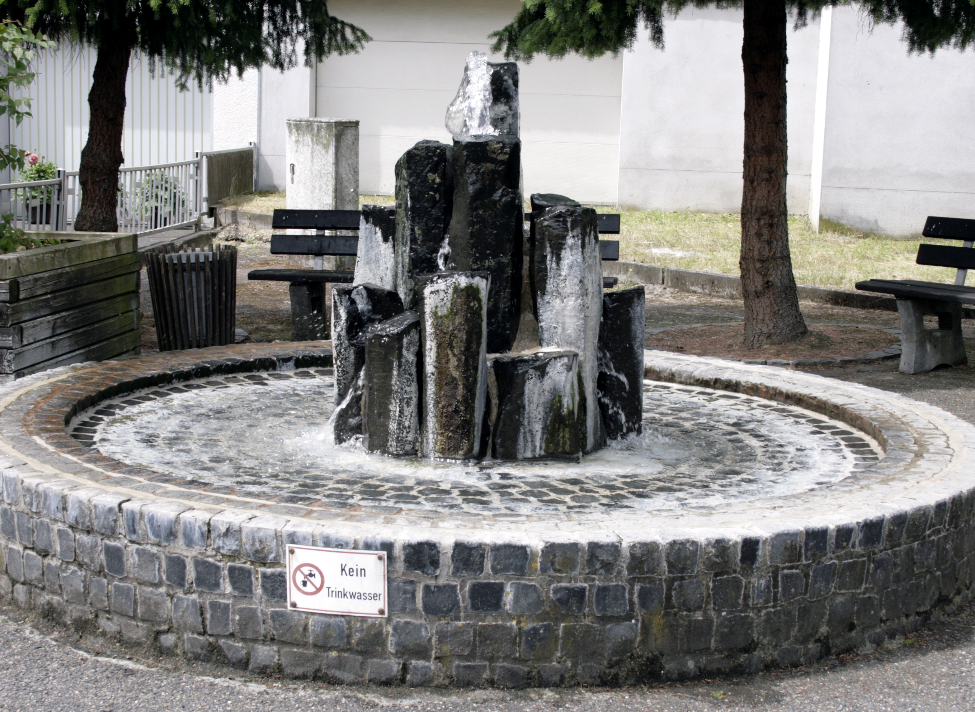 Springbrunnen aus Basaltsäulen auf dem Dorfplatz von Limburg-Ahlbach, Deutschland